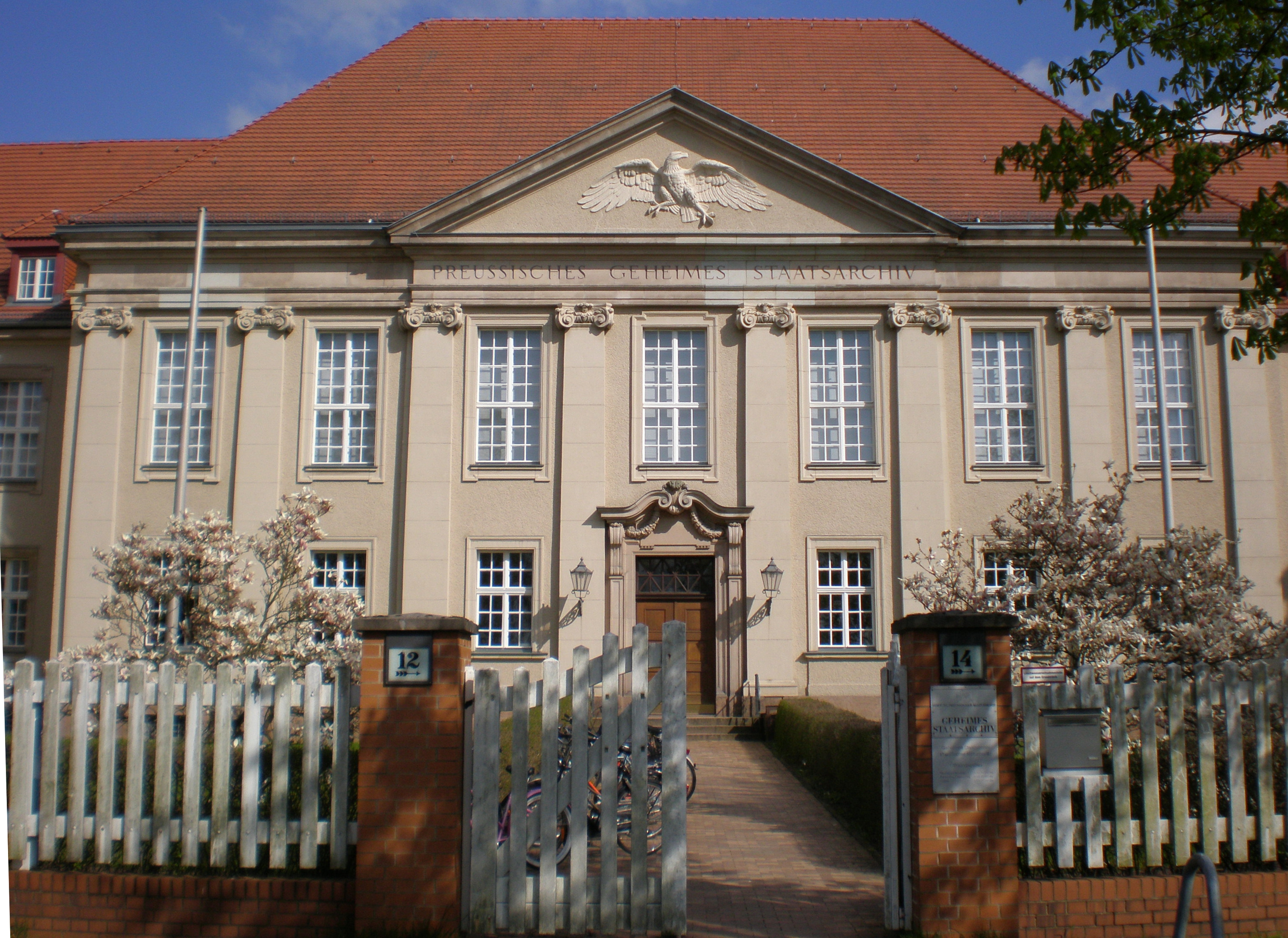 Geheimes Staatsarchiv Preußischer Kulturbesitz (GSTA PK)